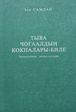 Тыва дыл: Зоя Самдан. Тыва чогаалдың кокпалары-биле. Эртемденниң демдеглелдери.